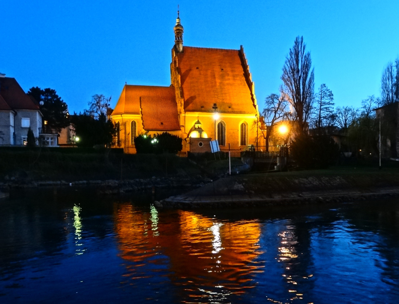 Katedra pw. św. Marcina i Mikołaja w Bydgoszczy, sanktuarium Matki Bożej Pięknej Miłości - widok od strony Brdy